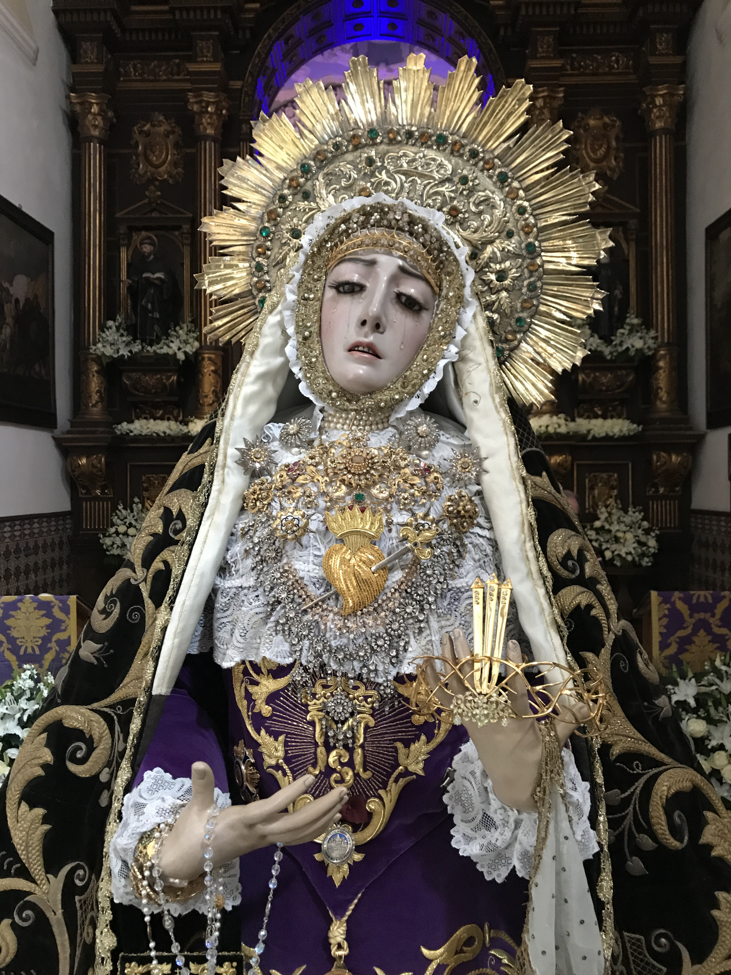 Imagen de Nuestra Señora de los Dolores.